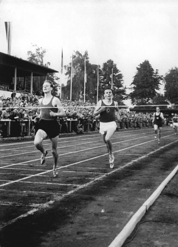 Klaus Richtzenhain, Siegfried Herrmann Zentralbild TBD-Wehse 14.9.1955 -3165- VI. Leichtathletik-Meisterschaften der Deutschen Demokratischen Republik vom 2. bis 5.9.1955 UBz: Im 1500 m Lauf der Männer ging Klaus Richtzenhain, Lok Leipzig, mit 3:46,8 vor Siegfried Hermann, SC Chemie Halle, (rechts, 3:47,0) durch das Ziel.